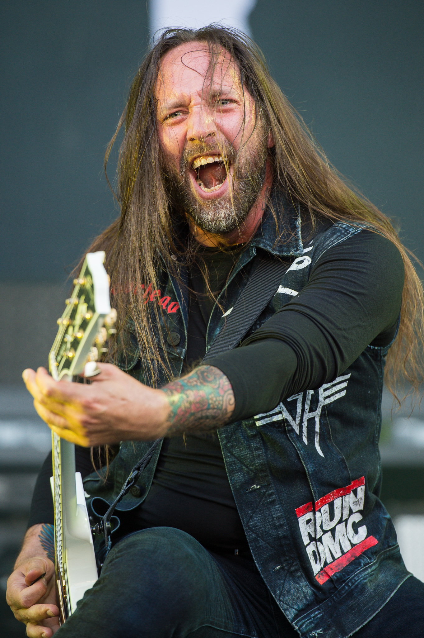 ARGO-Konzerte,Beck's Park Stage,Festival,In Flames,Konzert,Livekonzert,Livemusik,Musik,Niclas Engelin,RiP,Rock im Park 2015